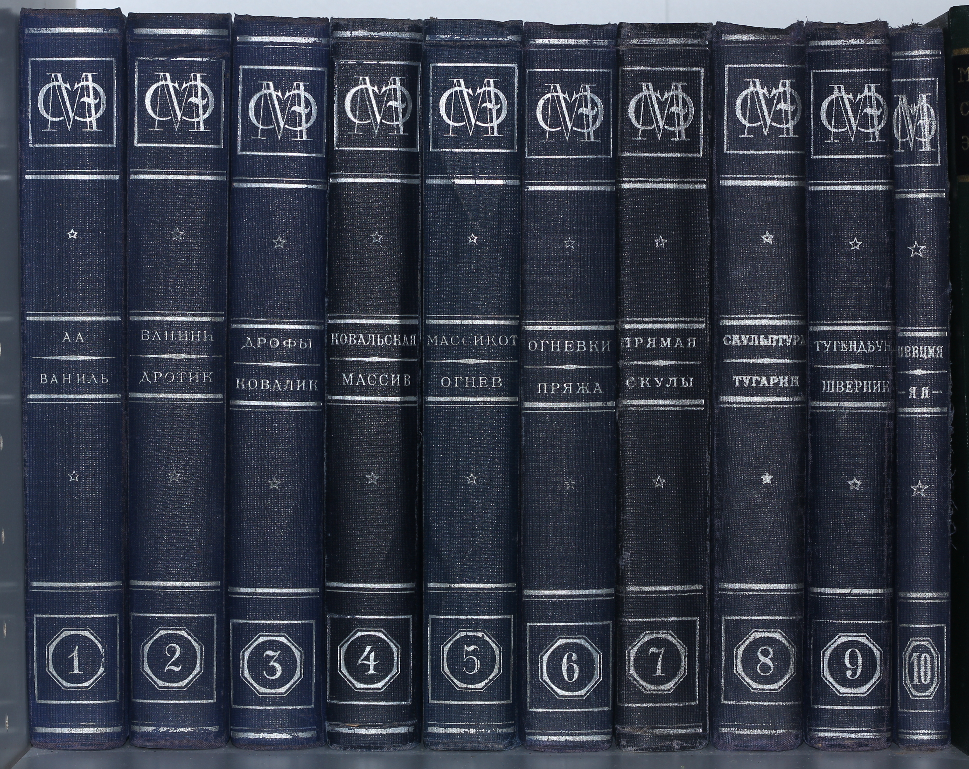 Малая советская энциклопедия первое издание в десяти томах.